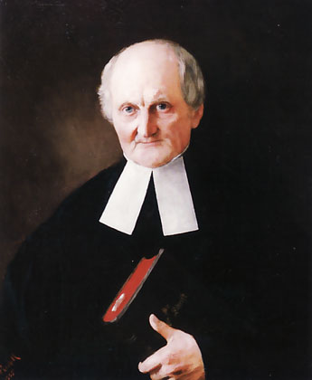 Portrait von Carl Eichhorn (1810 - 1890)